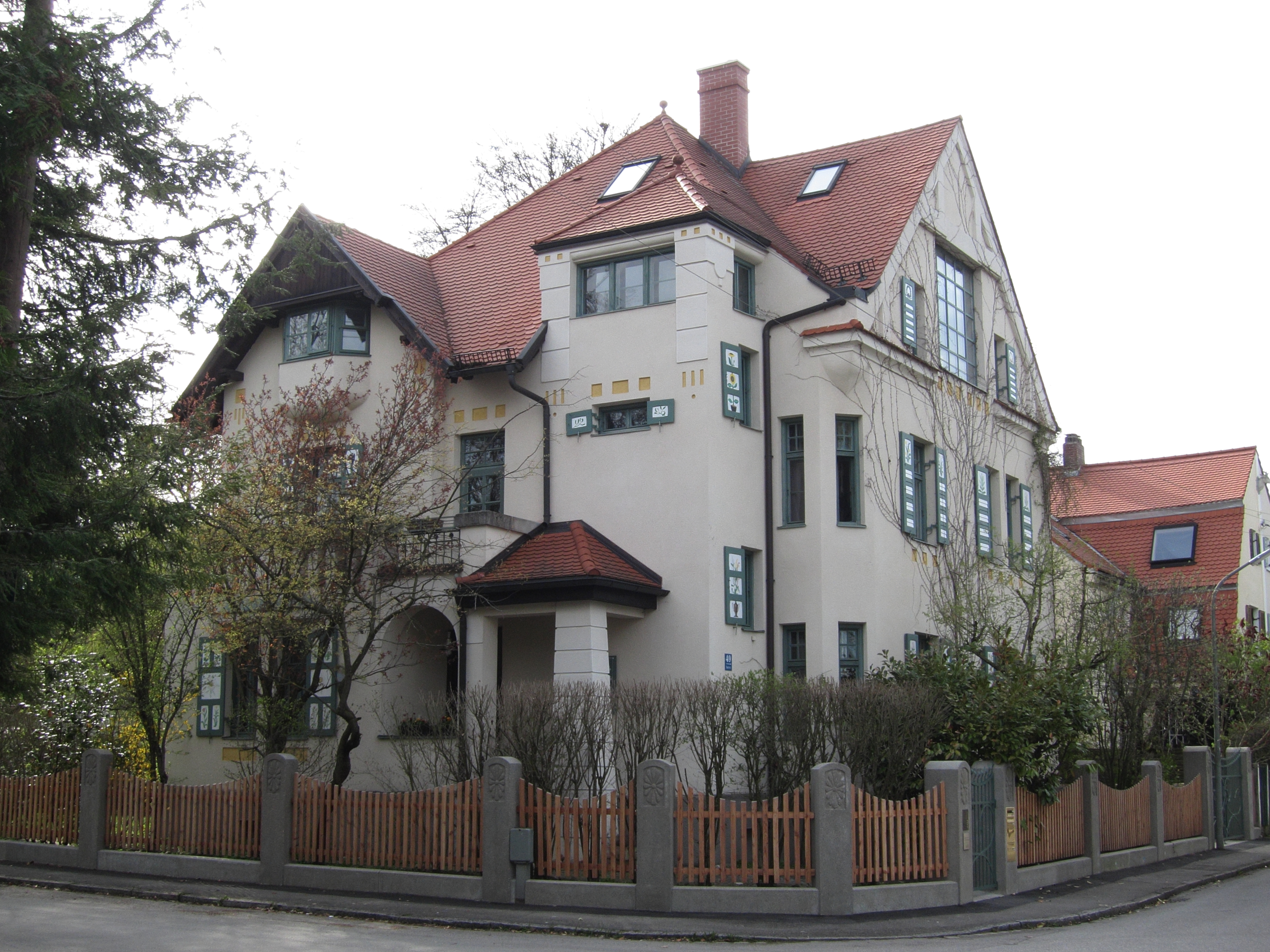 Dachstraße 49; Villa, Jugendstil, 1907 von Martin Saumweber und Sebastian Stecher.